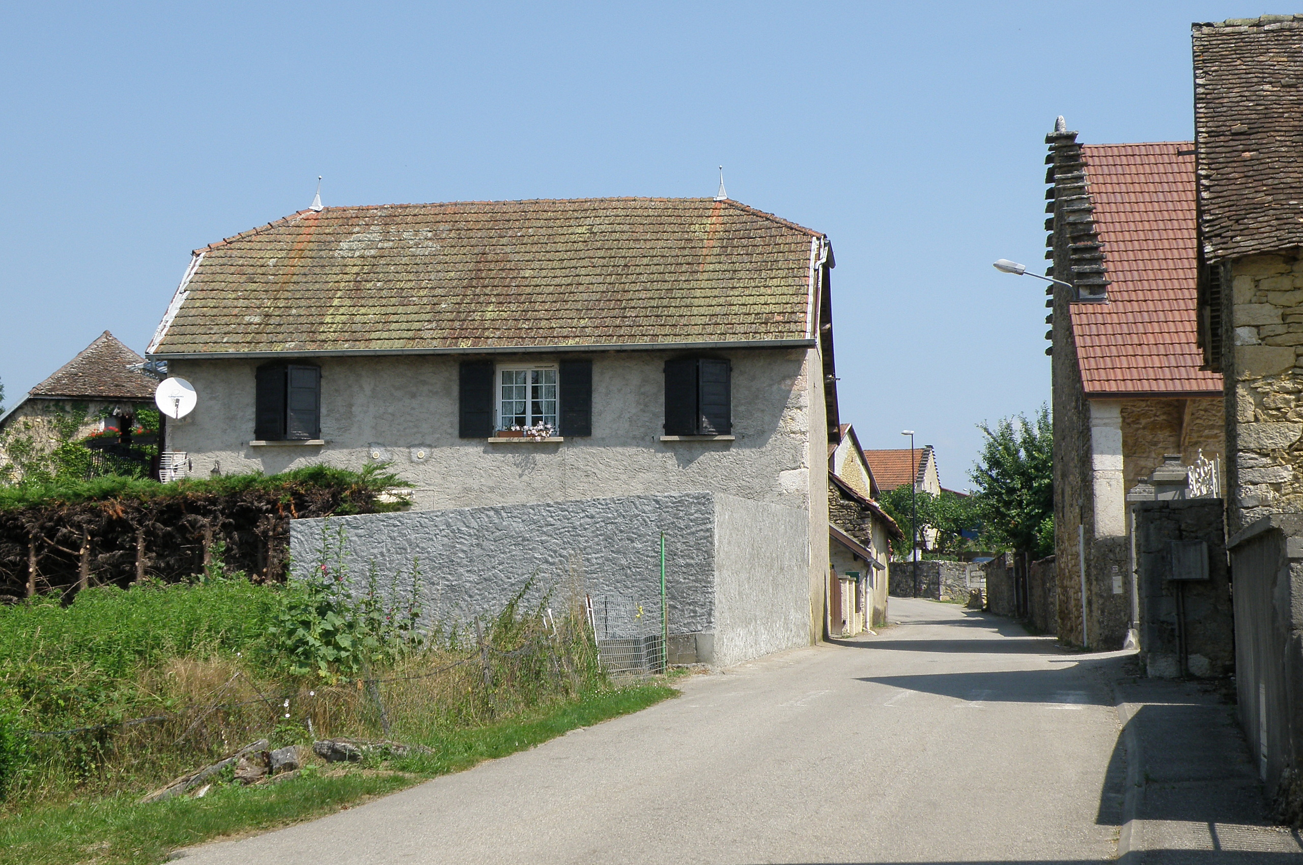 Parves, comm. du département de l’Ain (région Rhône-Alpes, France). Route de Sorbier, dans le hameau de Sorbier (dans la partie est de la commune).